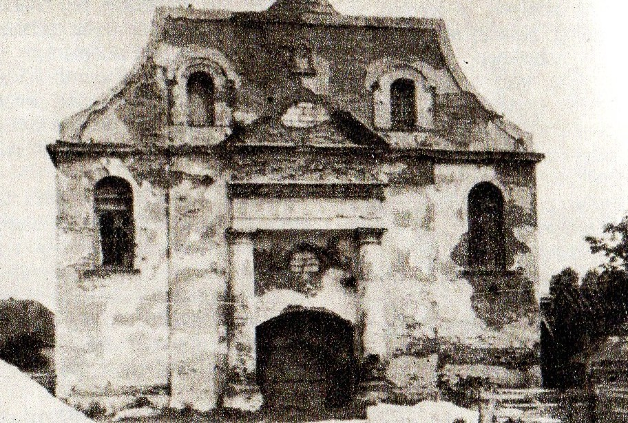 Synagoga w Orlaej - stan na 1988 rok.